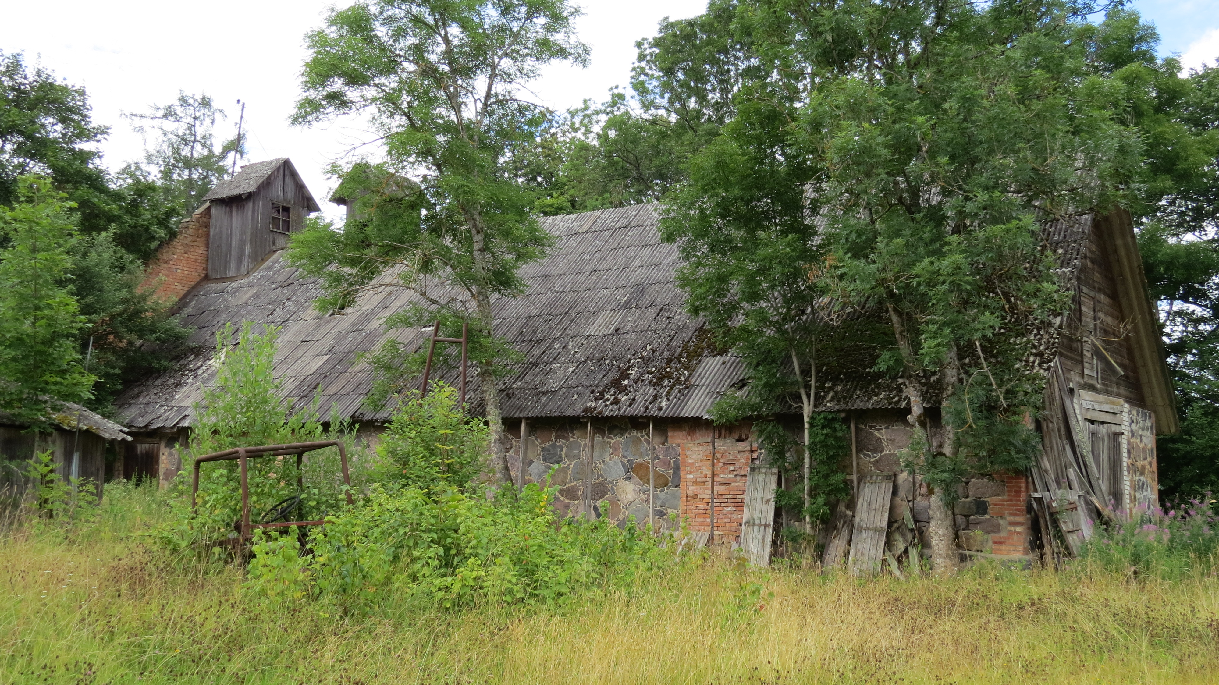 Vecate mõisa kõrvalhoone 2013. aastal.